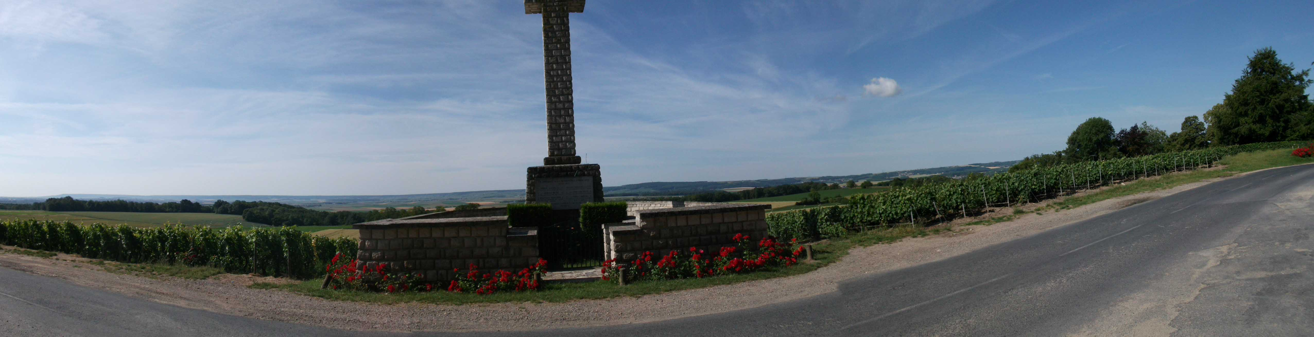 Merfy vue sur la vallée derrière le Monument aux résistants de la Deuxième guerre mondiale.